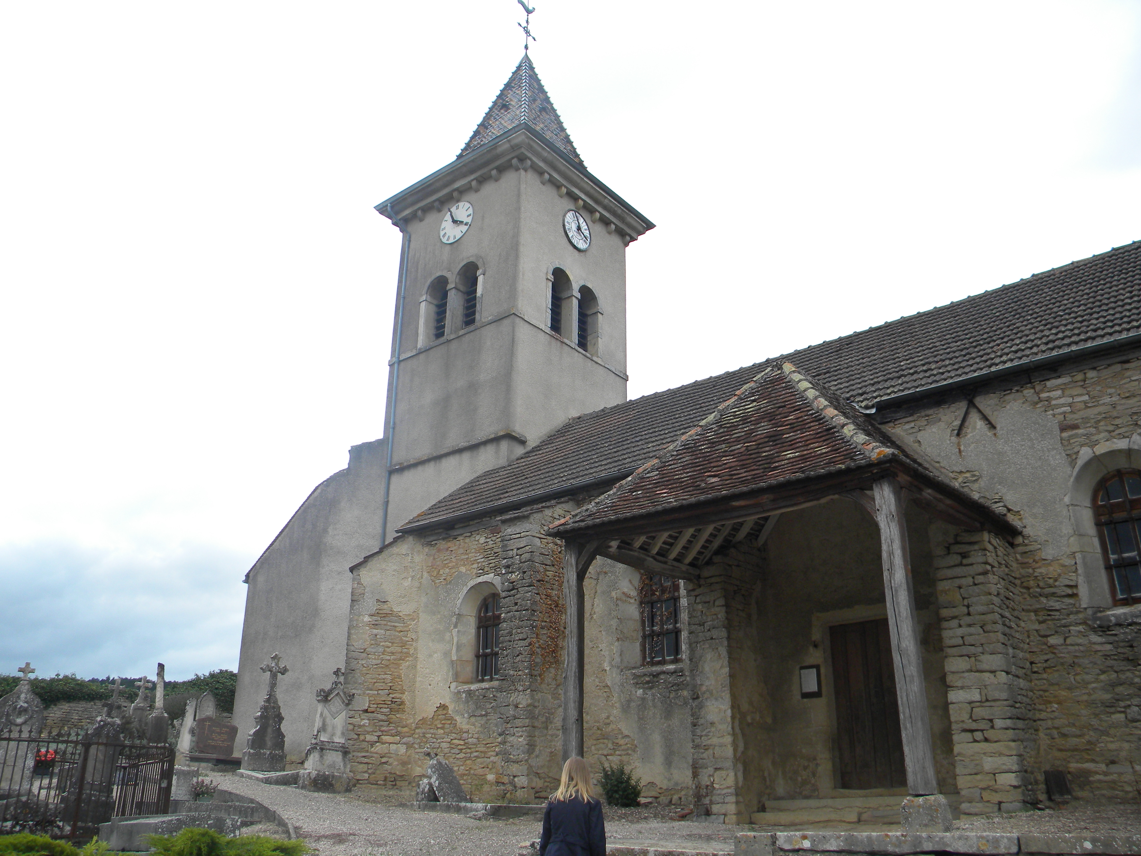 Preĝejo Sankta Petro en Collonges-lès-Bévy